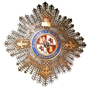 Placa de la Orden Naval de Maria Cristina (1891-1918)